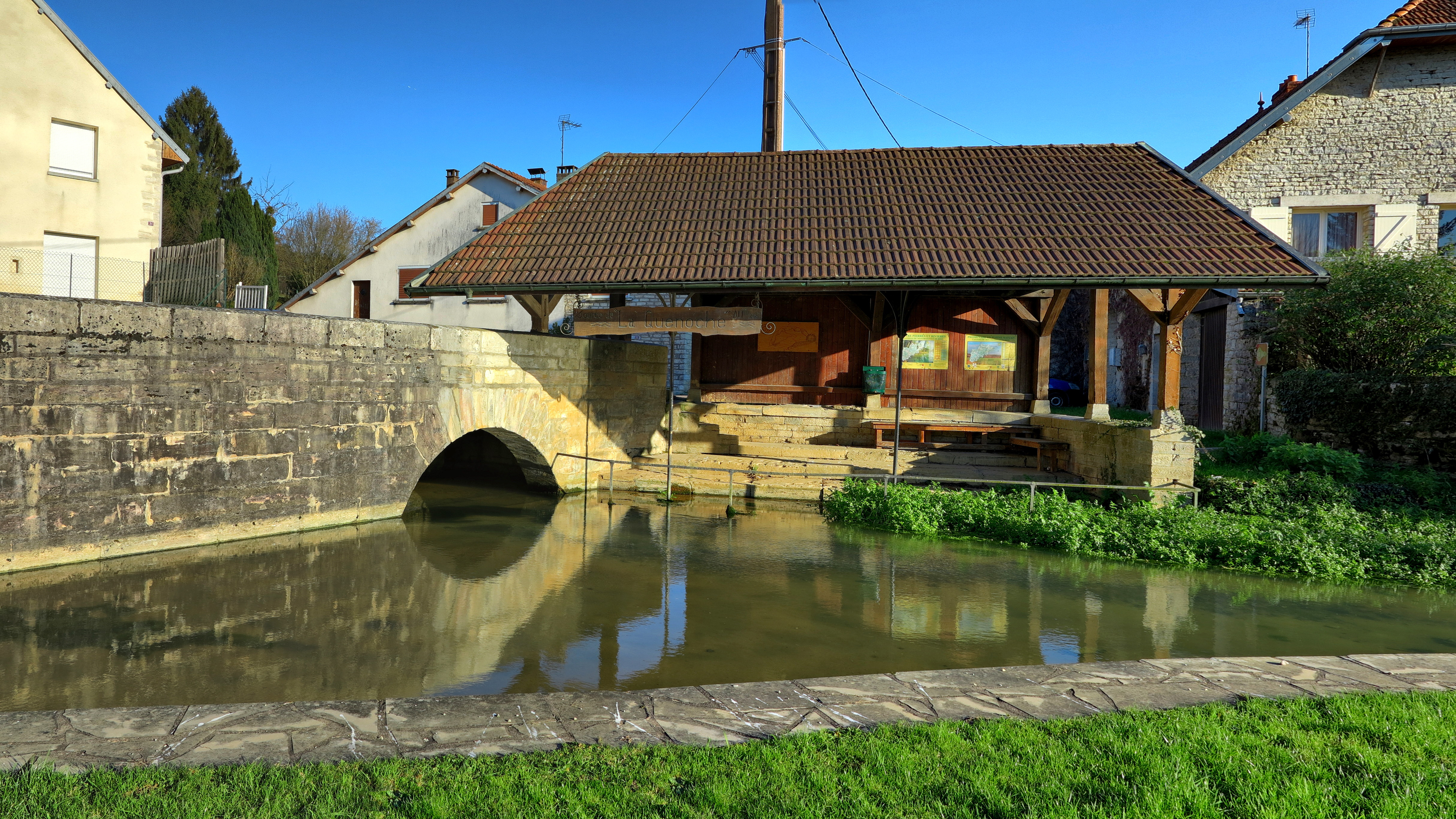 source et lavoir de la Quenoche